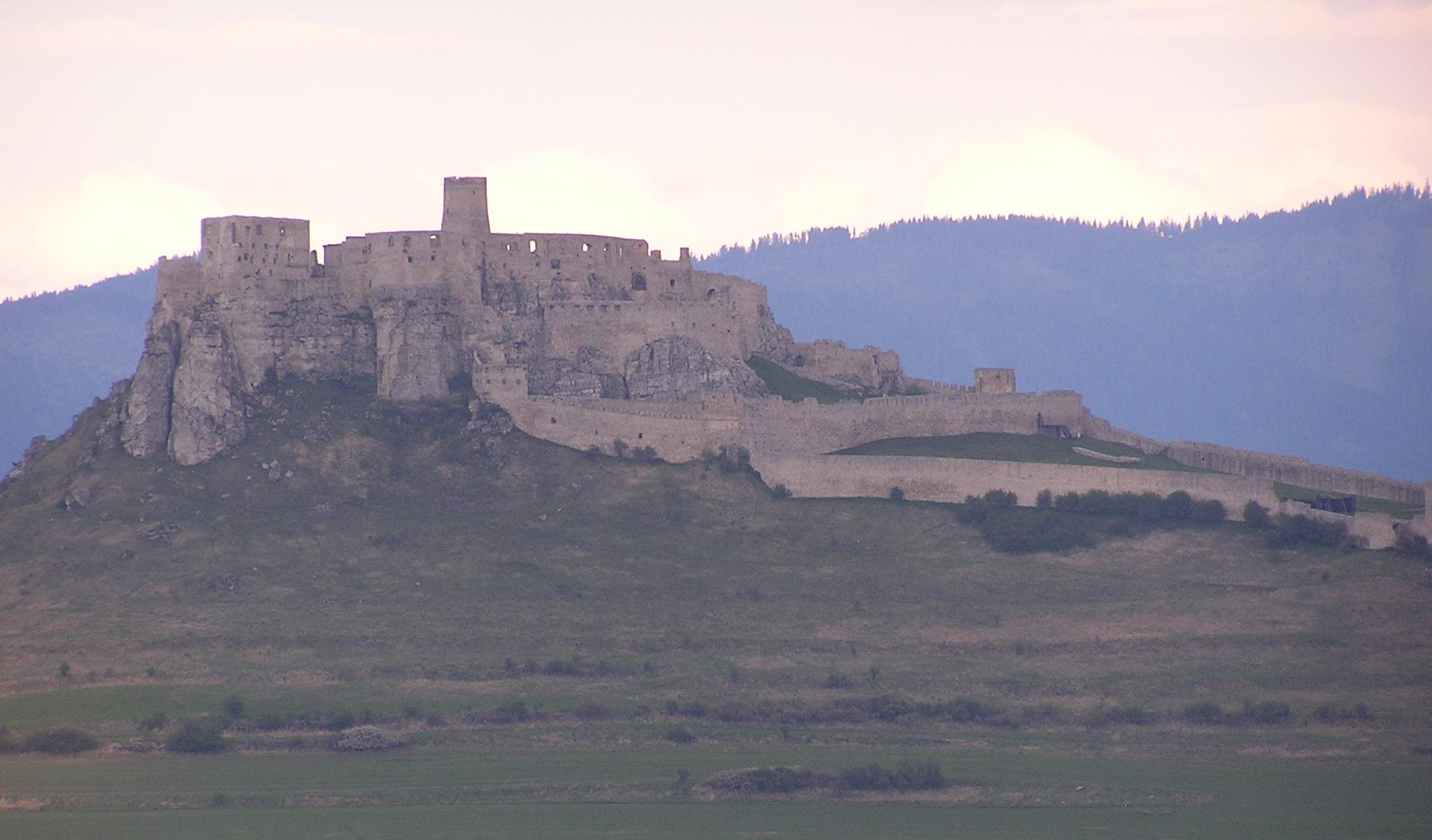 The Spišský Castle, Slovakia